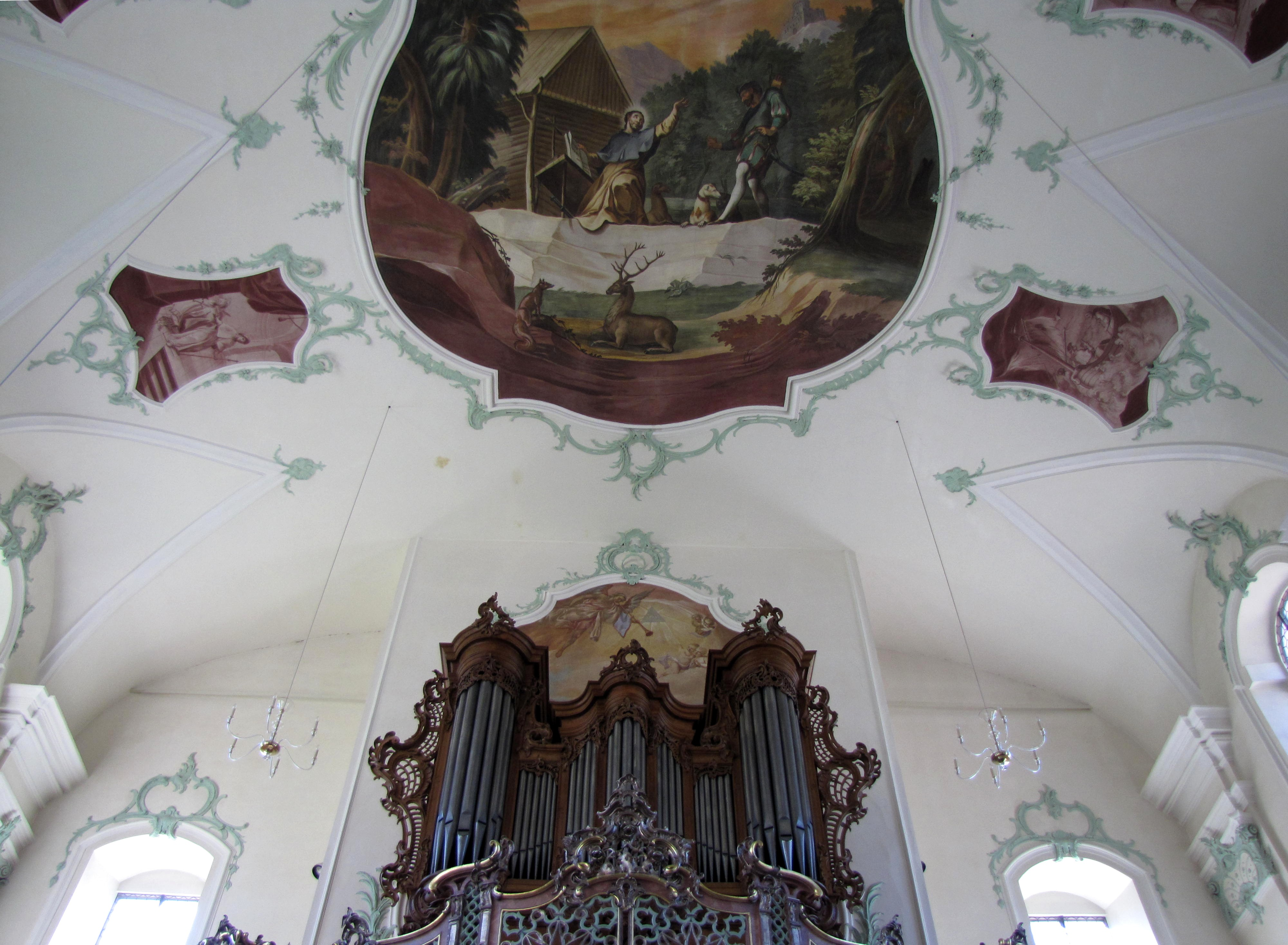 Baden-Württemberg, Ettenheimmünster, Pfarrkirche (Wallfahrtskirche) St. Landelin